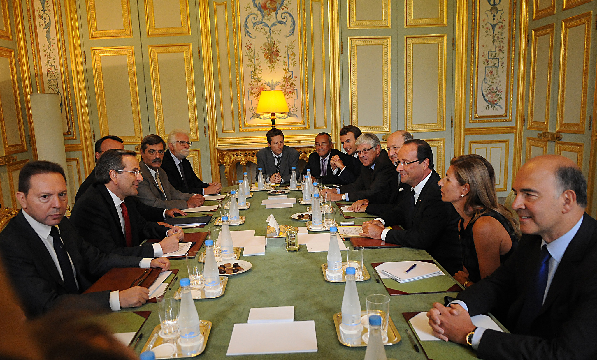 Francois Hollande - Αντώνης Σαμαράς